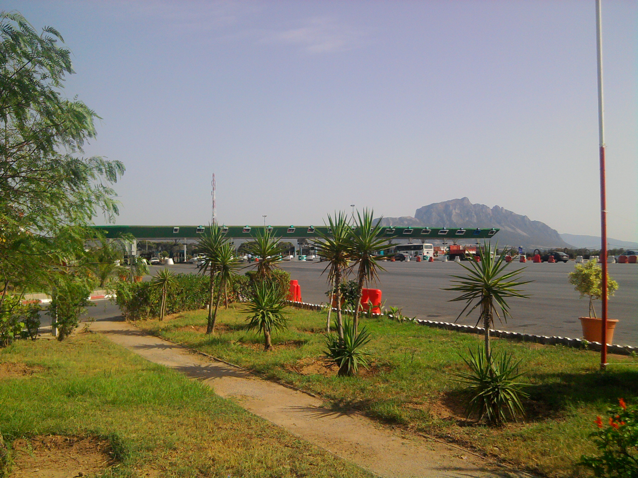 Tunisie, Autoroute A 1, Gare de péage de Mornag